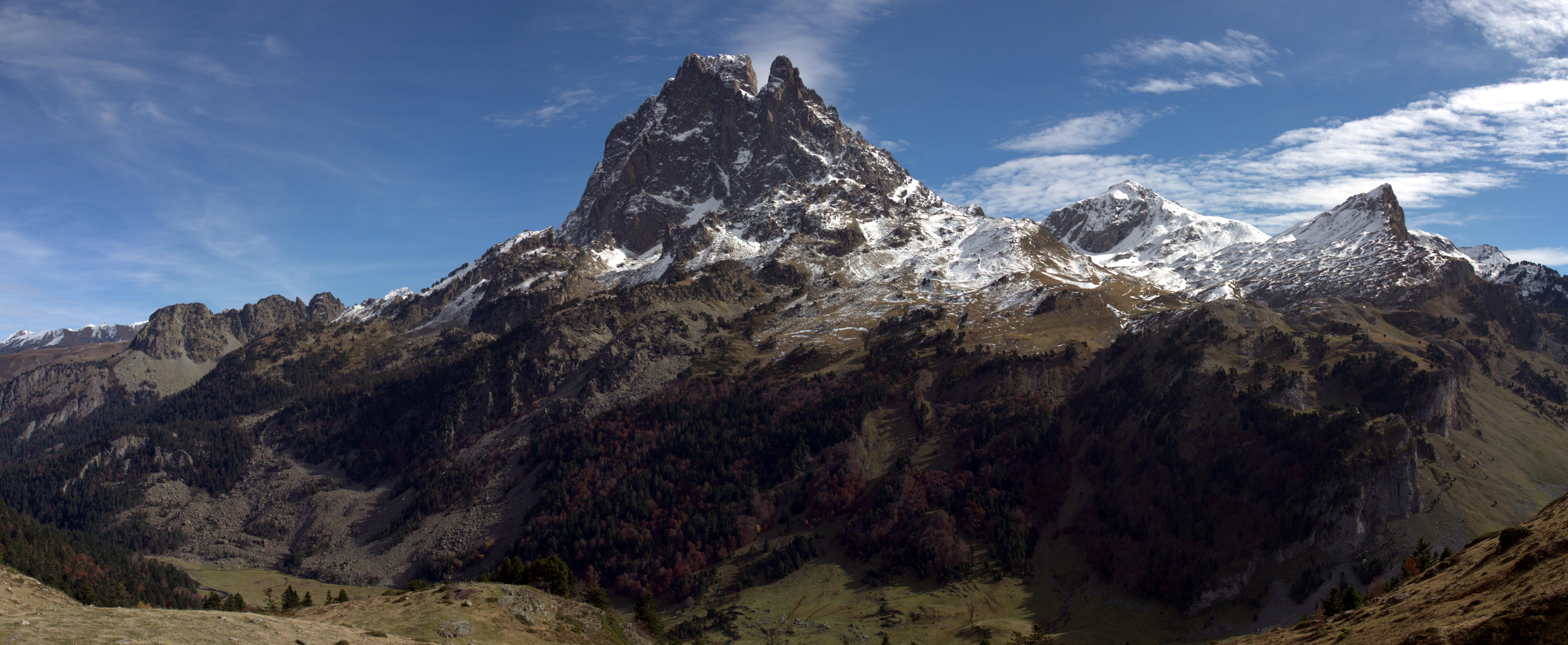 Pic du Midi d'Ossau, Béarn, France